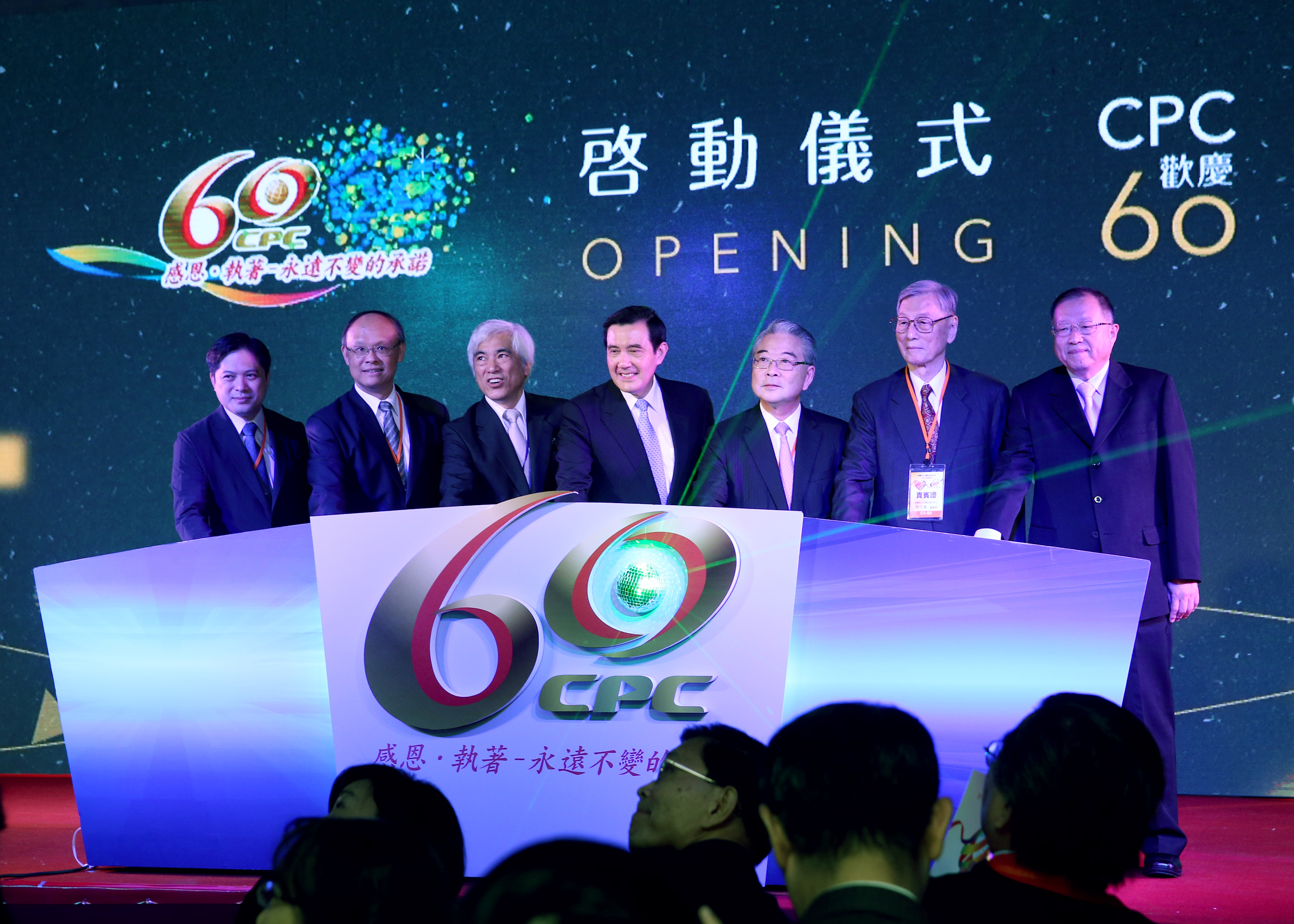 中華民國總統馬英九等人出席中國生產力中心60週年慶祝典禮啟動儀式。